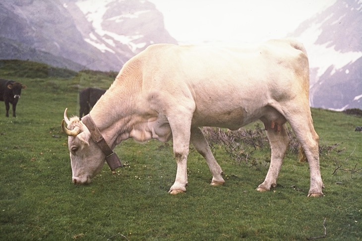 Photographie de vache lourdaise prise par l'auteur, Roland Darré, dans une estive au dessus de Luz Saint Sauveur